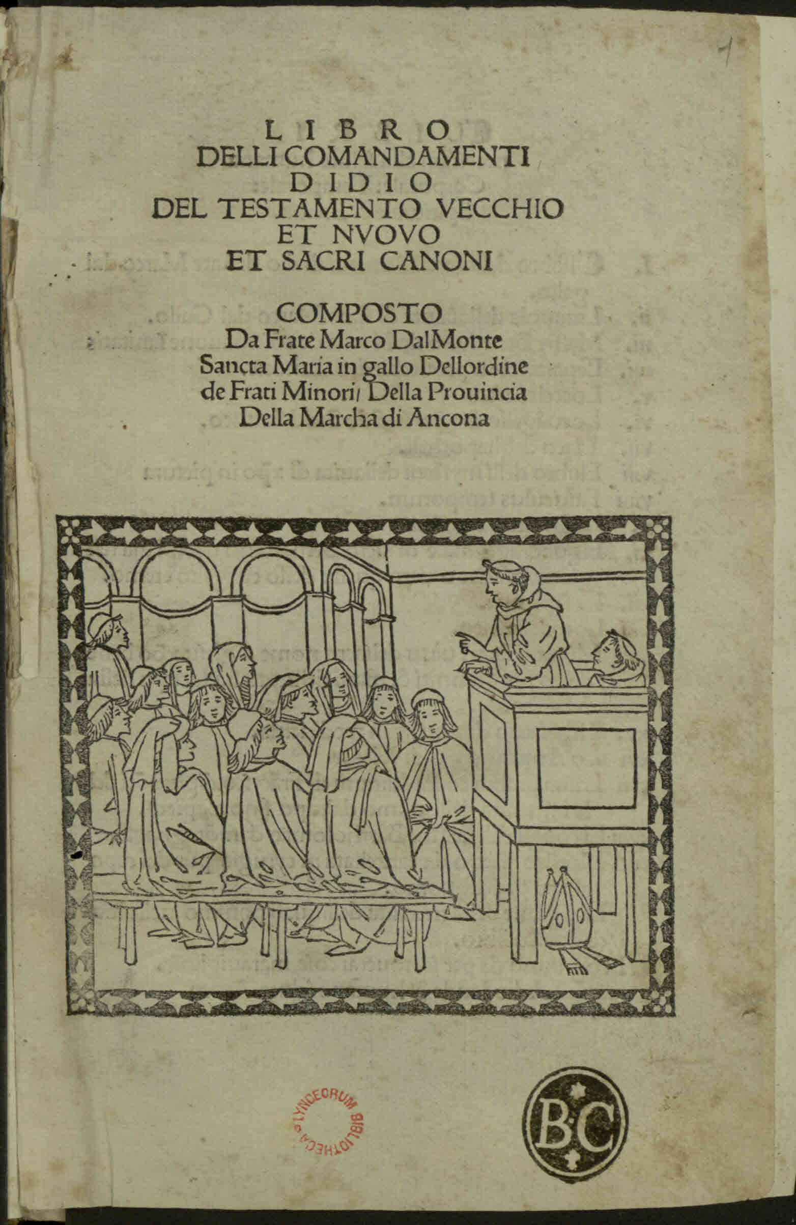 Libro dei comandamenti di Dio. - Impresso in Firenze : per mastro Antonio Miscomini, Anno MCCCCLXXXXIIII. - 92 c. ; a-h⁸, i¹⁰, k⁸, l¹⁰ ; 4° .